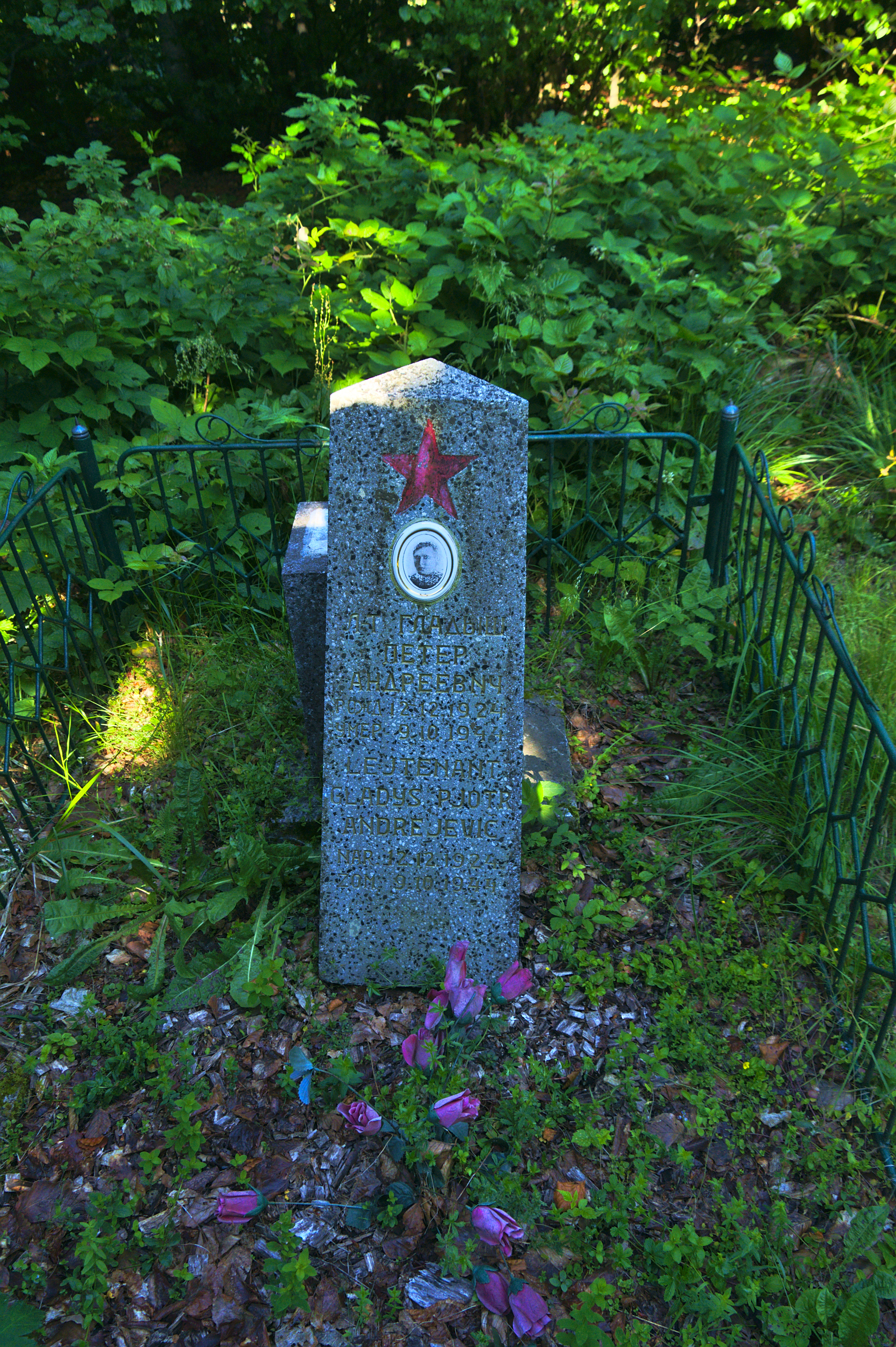 Památník "Lejtenant Gladys Pjotr Andrejevic" u cesty mezi Hrúbkami a Čierťažou, Národný park Poloniny